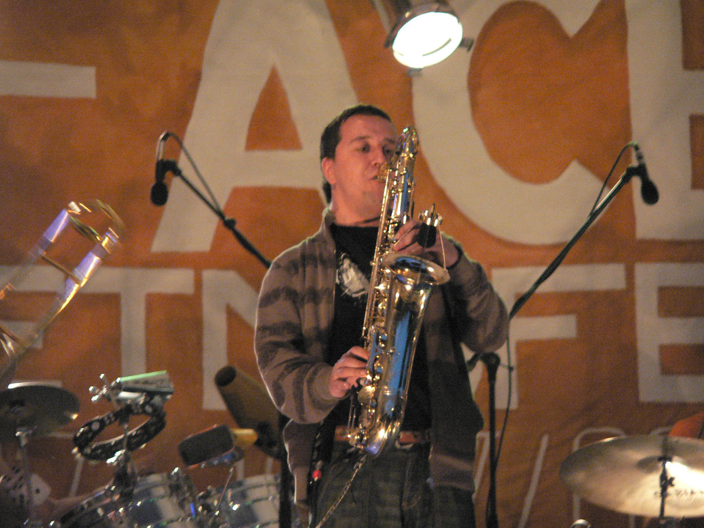 Markscheider Kunst sax player at Faces X